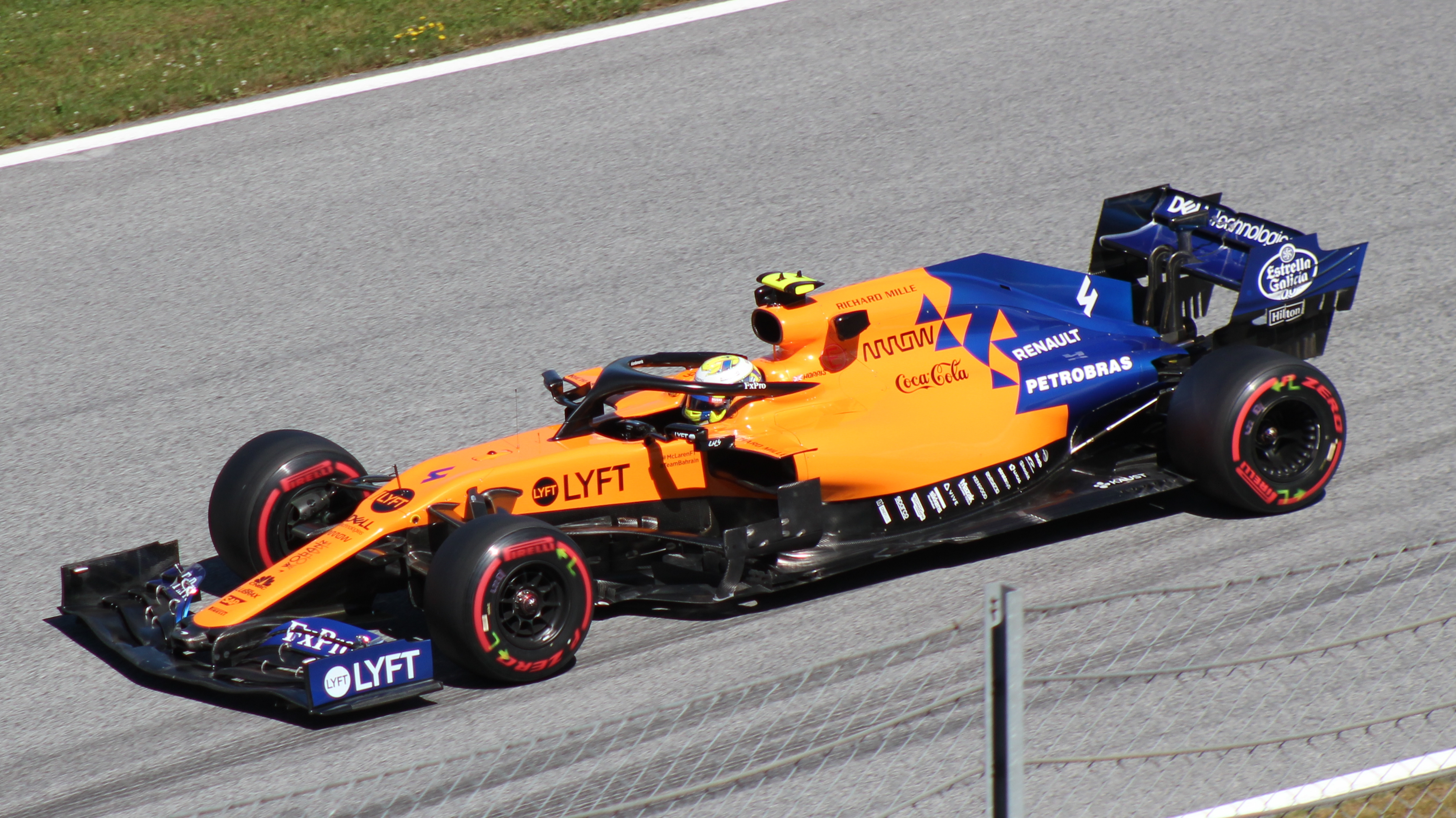 Norris beim Rennwochenende in Österreich 2019